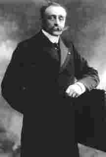 Etienne de Vrière - burgemeester Beernem (Belgium) - 1857-1936